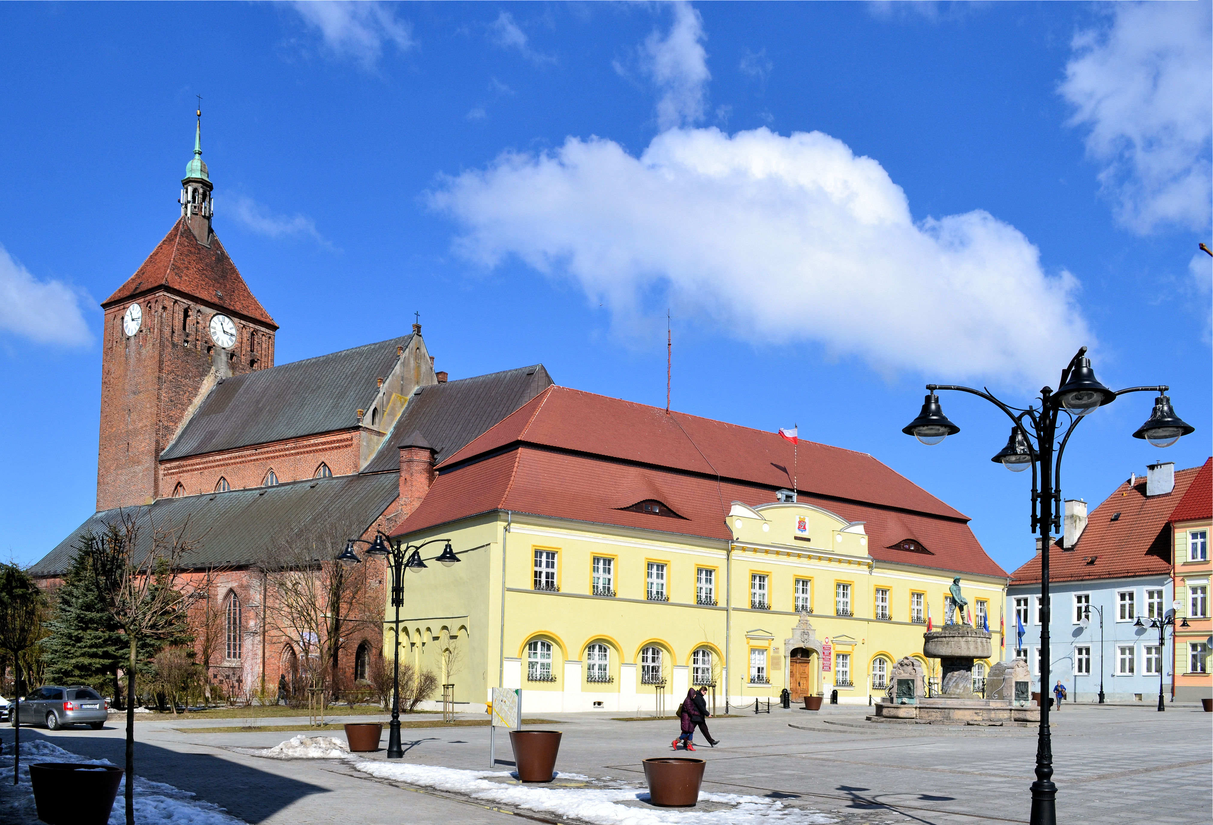 Rynek w Darłowie